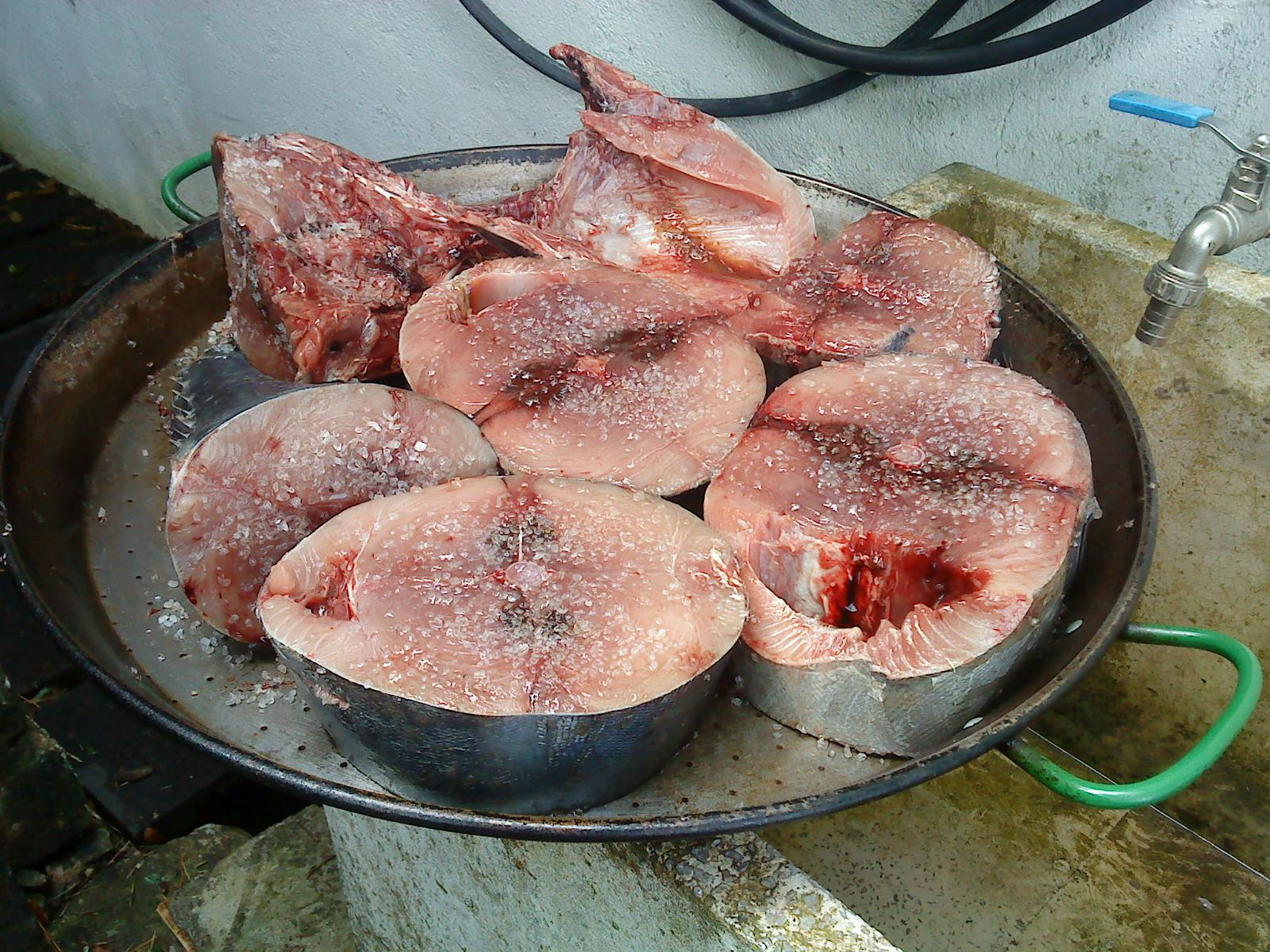 Preparación de bonito asado a la parrilla (ojael) en Ondarroa Bizkaia País Vasco (España).